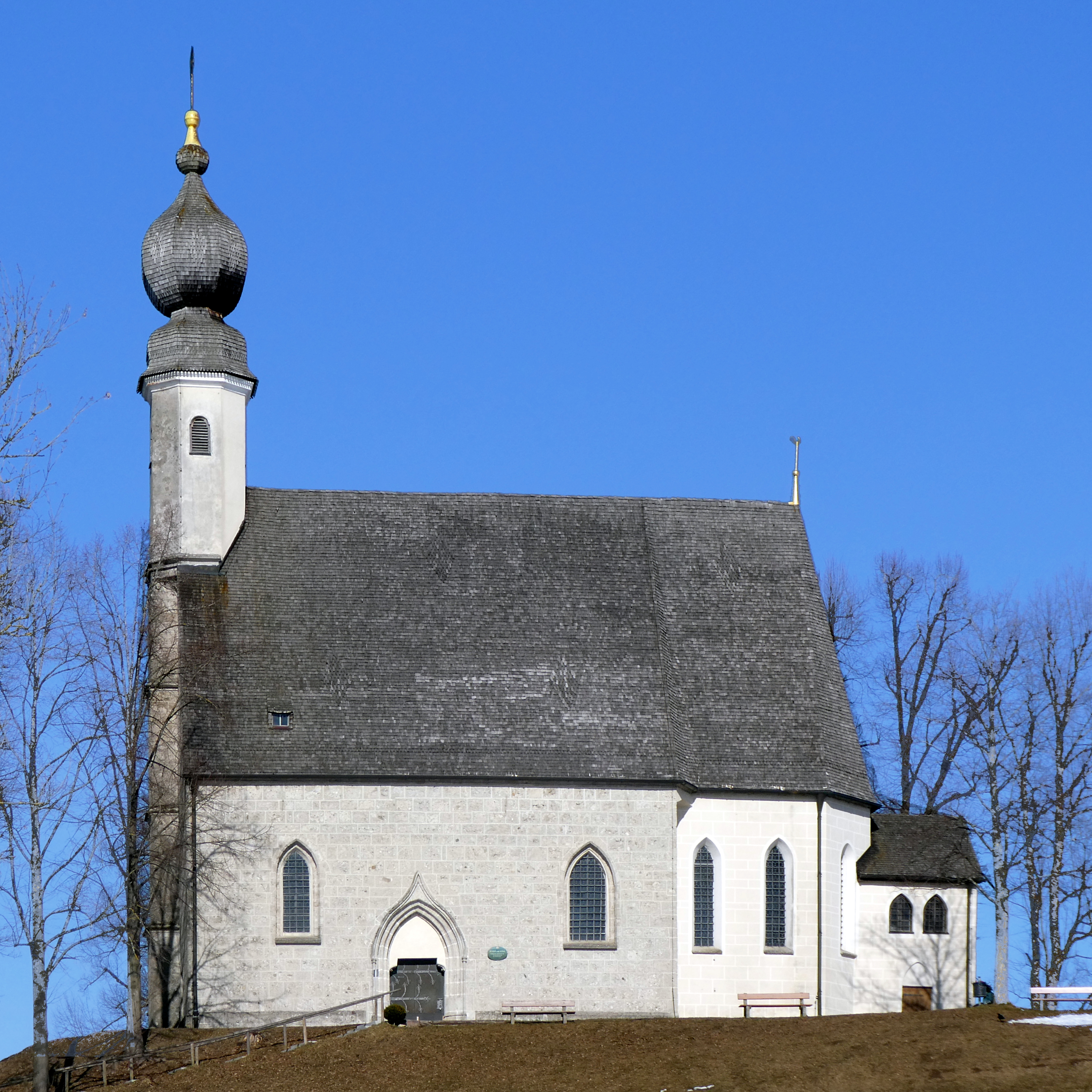 Surberg (Landkreis Traunstein), das Ettendorfer Kircherl (St. Veit und Anna) von Südsüdwesten gesehen.